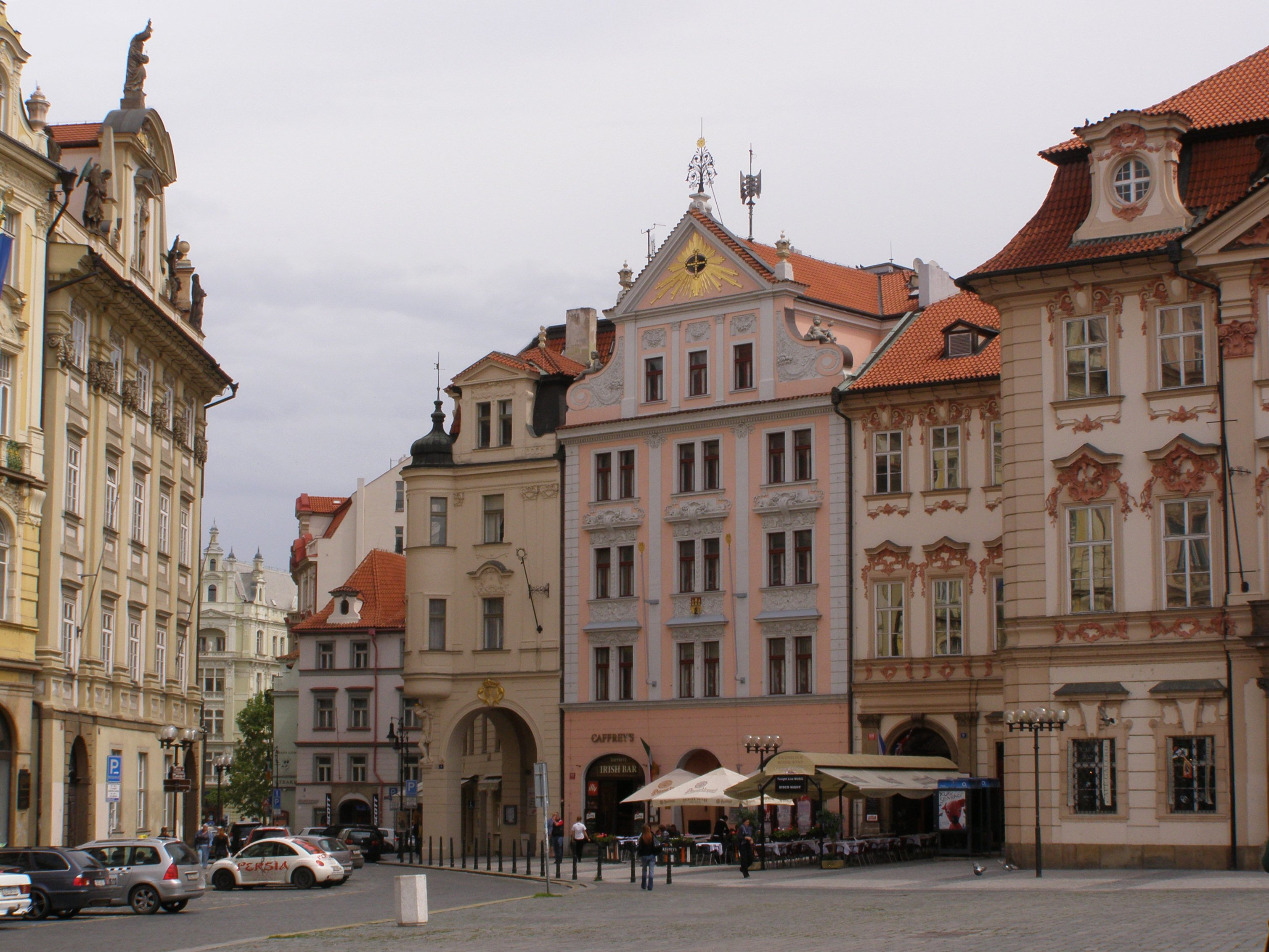 Praha, Staré Město, Staroměstské náměstí, pohled do ulice Dlouhá, uprostřed dům Zlatý kříž